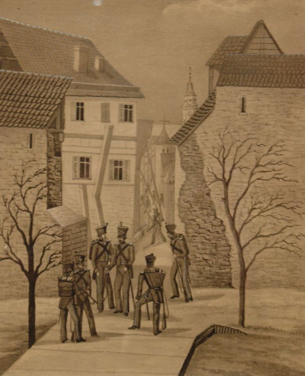 Landjäger auf der Flucht aus Tübingen durch die Maueröffnung am Rübenloch (Lange Gasse, am 23. Januar 1831, Tuschezeichnung.